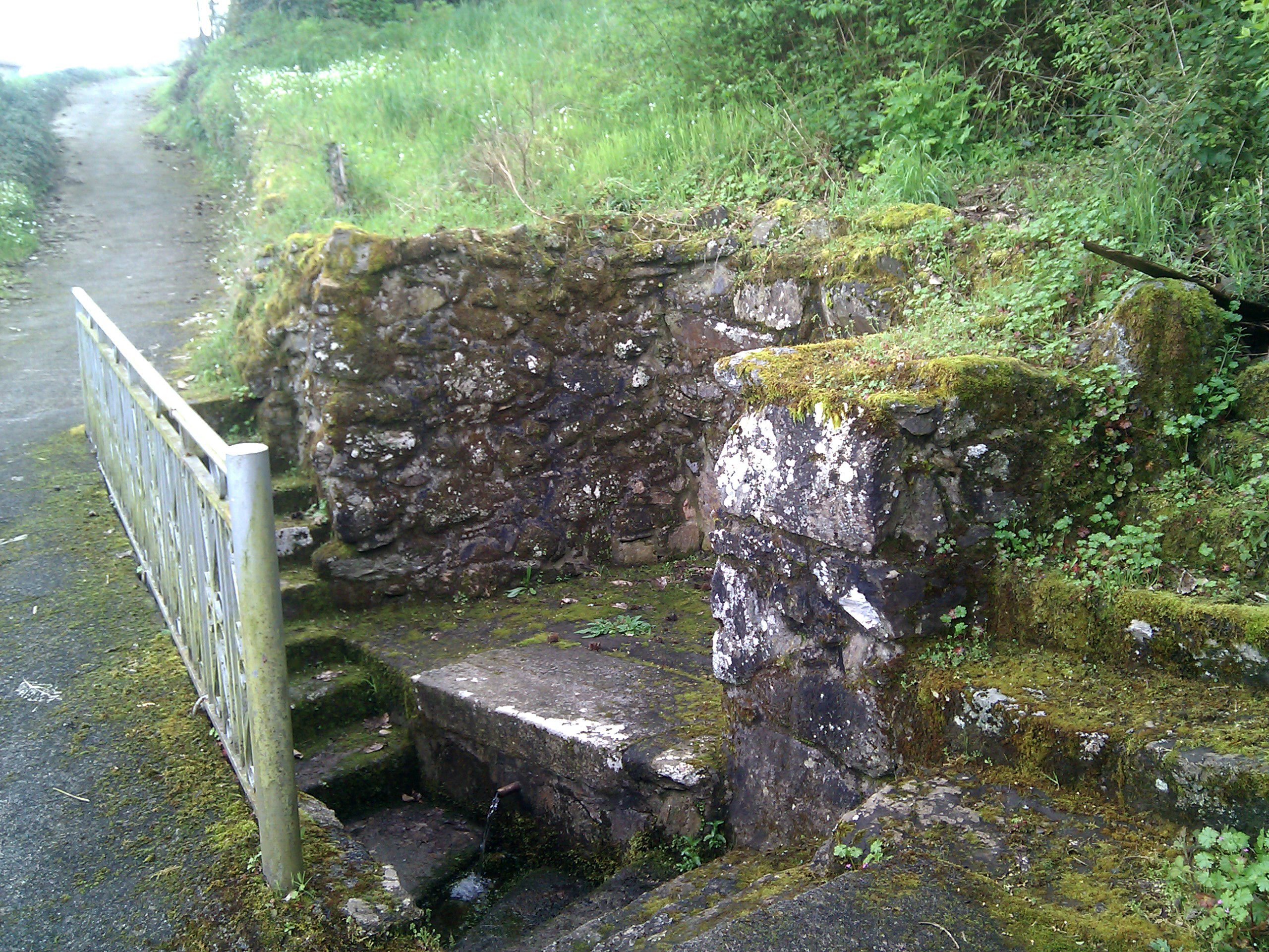 Fonte en Quintela - San Salvador de Asma (Chantada)